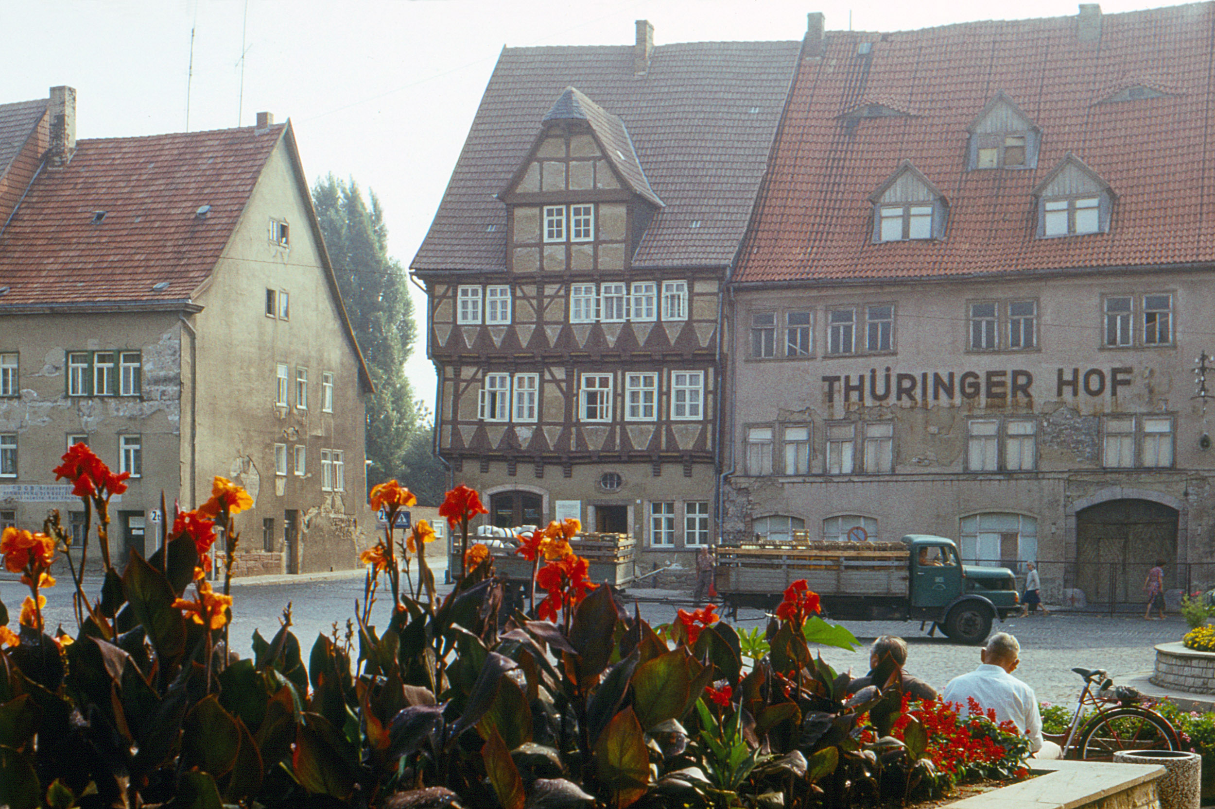 Geschlossener Thüringer Hof im Jahr 1982